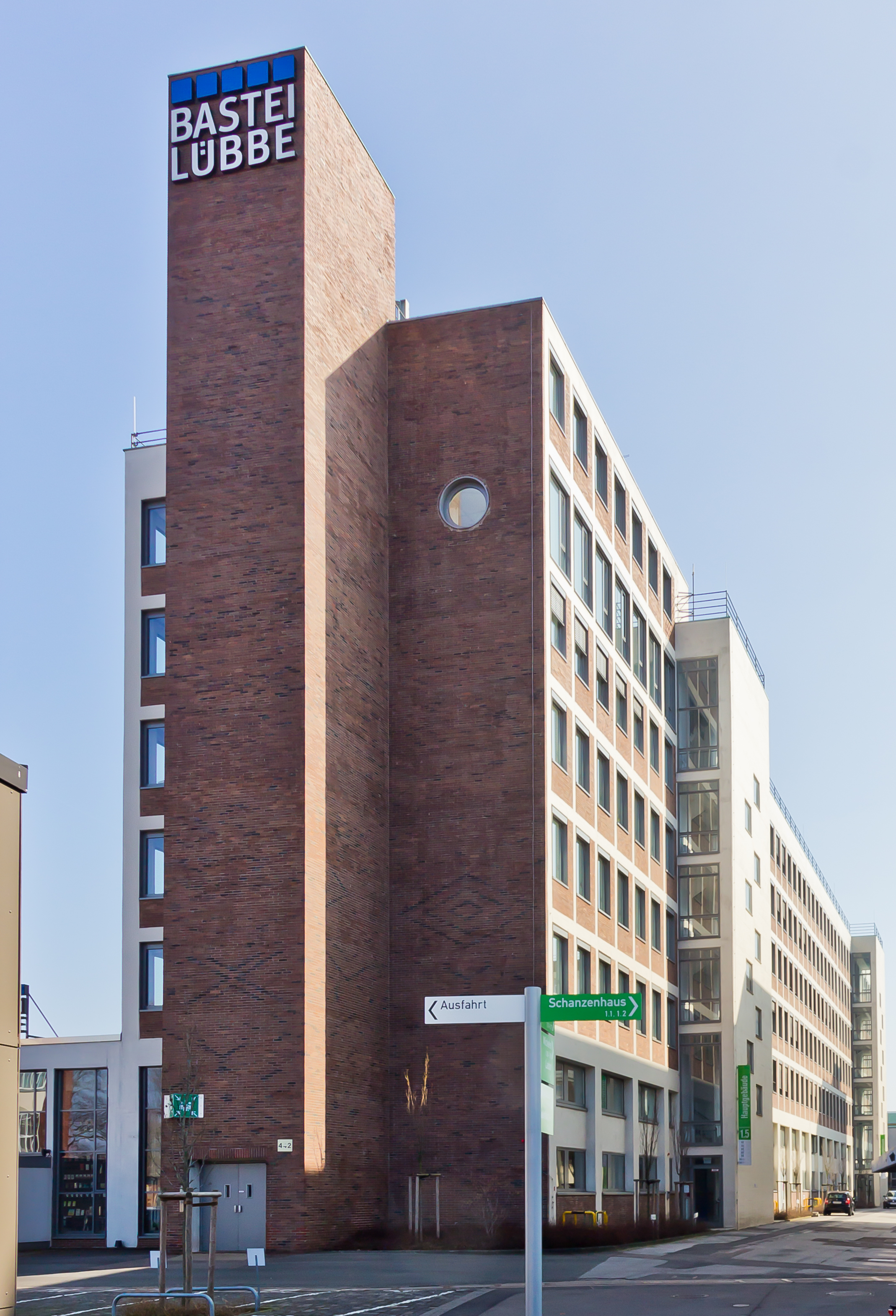 Bastei Lübbe-Zentrale auf dem Gelände des Carlswerks, Köln